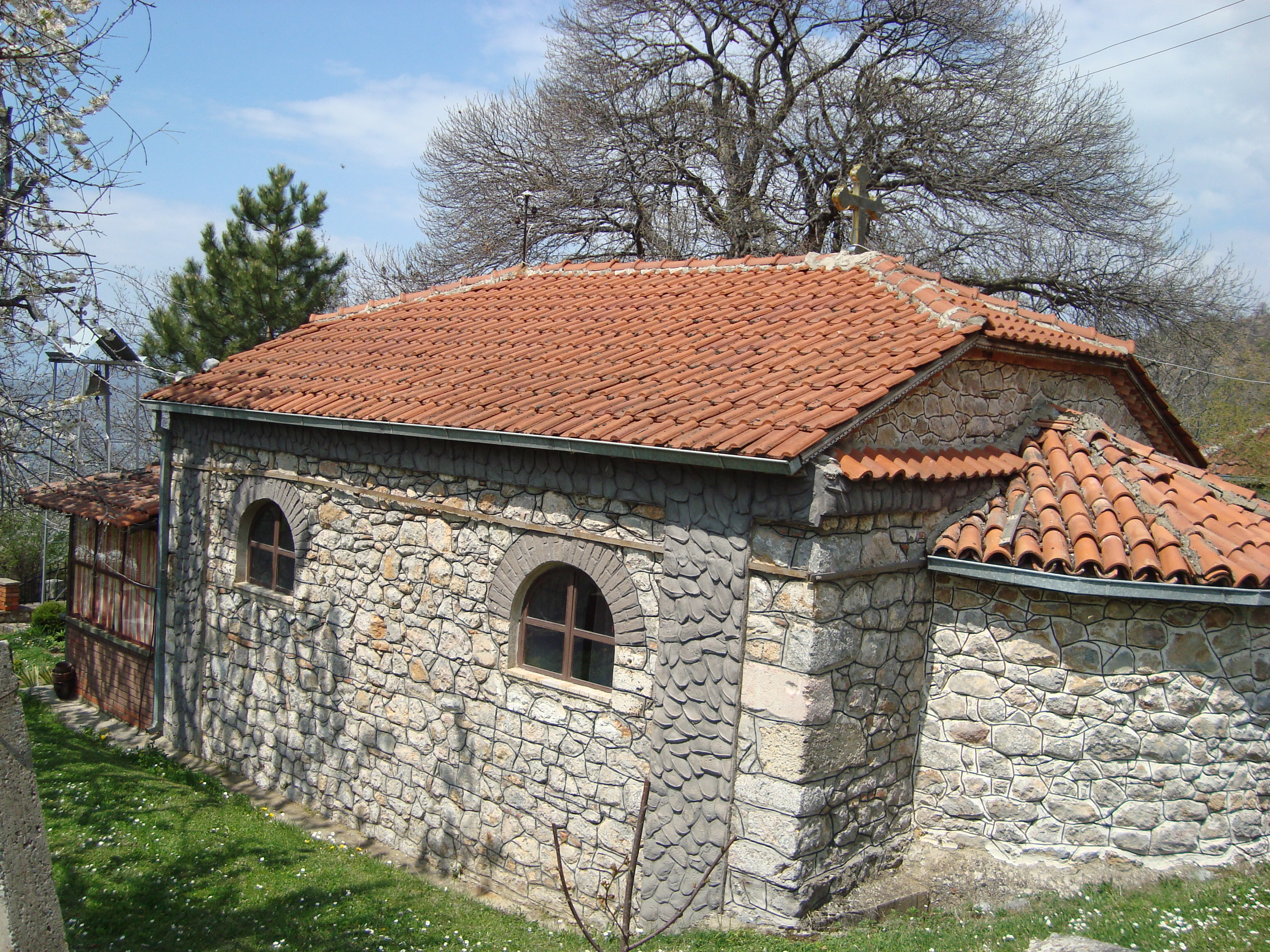 Велгошти црква